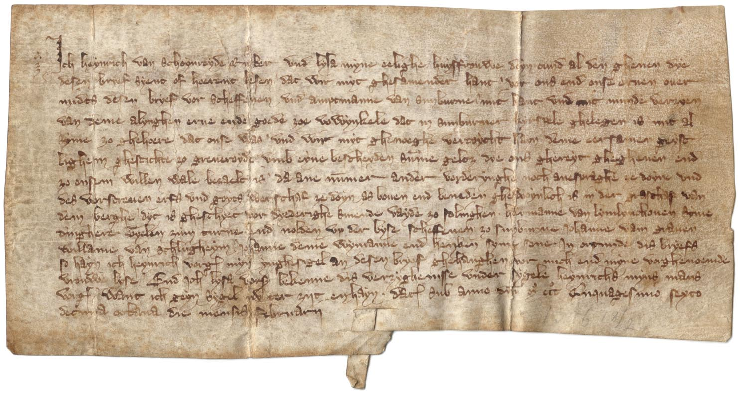 Urkunde vom 18.02.1356 über den Verkauf des Erbes und Gutes Vowynkele durch den Besitzer Ritter Heinrich von Schönrode und seiner Frau Lysa an das Stift zu Gräfrath (Stadtarchiv Wuppertal) Text der Urkunde: Ich Heynrich van Schöynroyde Ritter und Lysa myne eelighe huysfrouwe doyn cund al den ghenen (denjenigen) dye desen bryef syent of hoerent lesen, dat wir myt ghesa-mender hant vor ons end onse erven overmidts desen bryef vor Scheffenen und Amptmanne van Sunburne mit hant und mit munde verzyen (verzichten) van deme alynghen (ganzen) erve ende goede zoe Vowynkele, dat in Sunburner kyrspele ghelegen is, mit al syne zo ghehoere, dat onse was, und wir mit ghenoeghe vercoycht (verkauft) hayn deme eersamen geystlighem ghestichte zo Oreveroyde (Gräfrath) umb eyne bescheyden (festgesetzte) Summe gelcz (Geldes), dye ons ghereyt (bereit gelegt, baar) ghegheven end zo onsem willen wole (wol) bezaelt is, da ane nummer ander vorderynghe noch anes praghe ze doyne und des vorscreven (obengenannten) erfs und goyts werschaf zo doyn as boven end beneden (oben und unten, so viel als überall) ghewoynlich is in der grafschaf von dem Berghe. Dit is geschyet (geschehen) vor Dyederighe Smende vayde (Vogt) zo Solinghen, Hermanne van Lymlynchoven syne dinghere (vielleicht Gerichtsbote), Tyelen zum turue (daran erinnert noch die Straße am Turm in Sonnborn; Turn — Turm) end Nolden up der byse scheffenen zo Sunburne, Johanne vam graven, Willame van Schlugheym, Johanne deme Wymanne end Henken syme sone. In orcund dis bryefs so hayn ich Heynrich vorg. myn ynghesigel an desen bryef ghehanghen vor mich end myne vorghenoemde (obengenannte) vrouw Lyse. End ich Lysa vorss. (vorgenannte) be kenne dis verzyghenisse (Verzicht) under sygele Heynrichs myns mans vorg. want ich gheyn sygel en nu ter zyt enhayn (nicht habe). Datum sub anno domini M CCC quinquagesimo sexto decima octava die mensis februarij. Scan und Bildbearbeitung: Andreas Schäfer